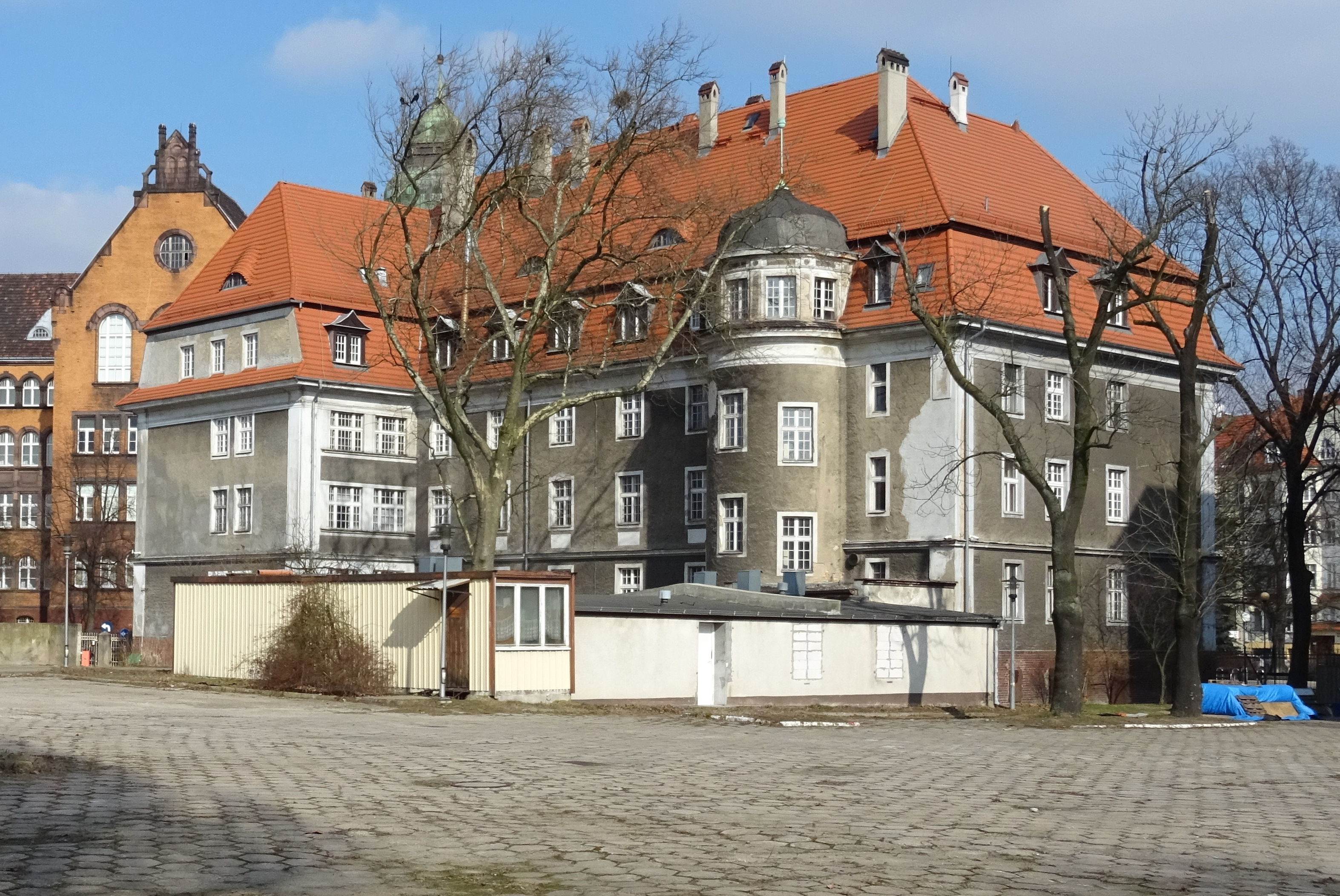 Poznań. Dawny wildecki dom starców - elewacja podwórzowa.